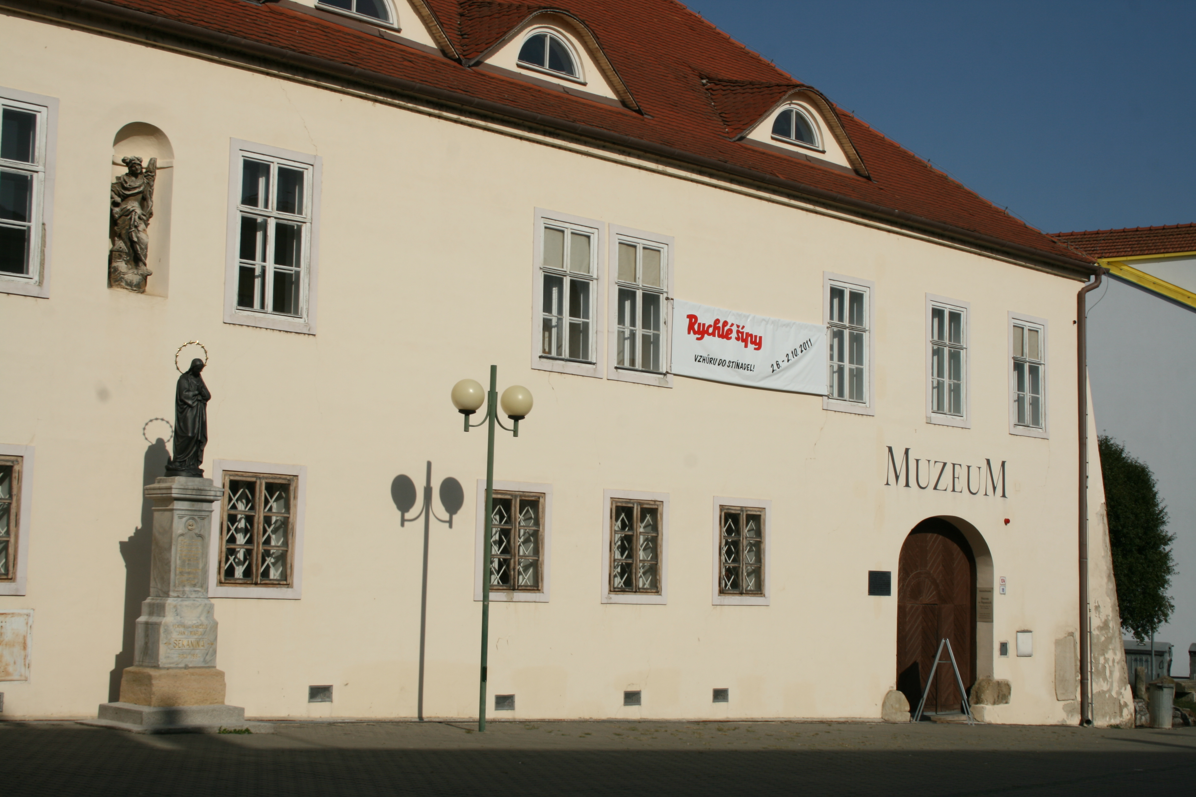 Muzeum Brněnska ve Šlapanicích na Masarykově náměstí v budově někdejší scholasterie. Pohled od západu.